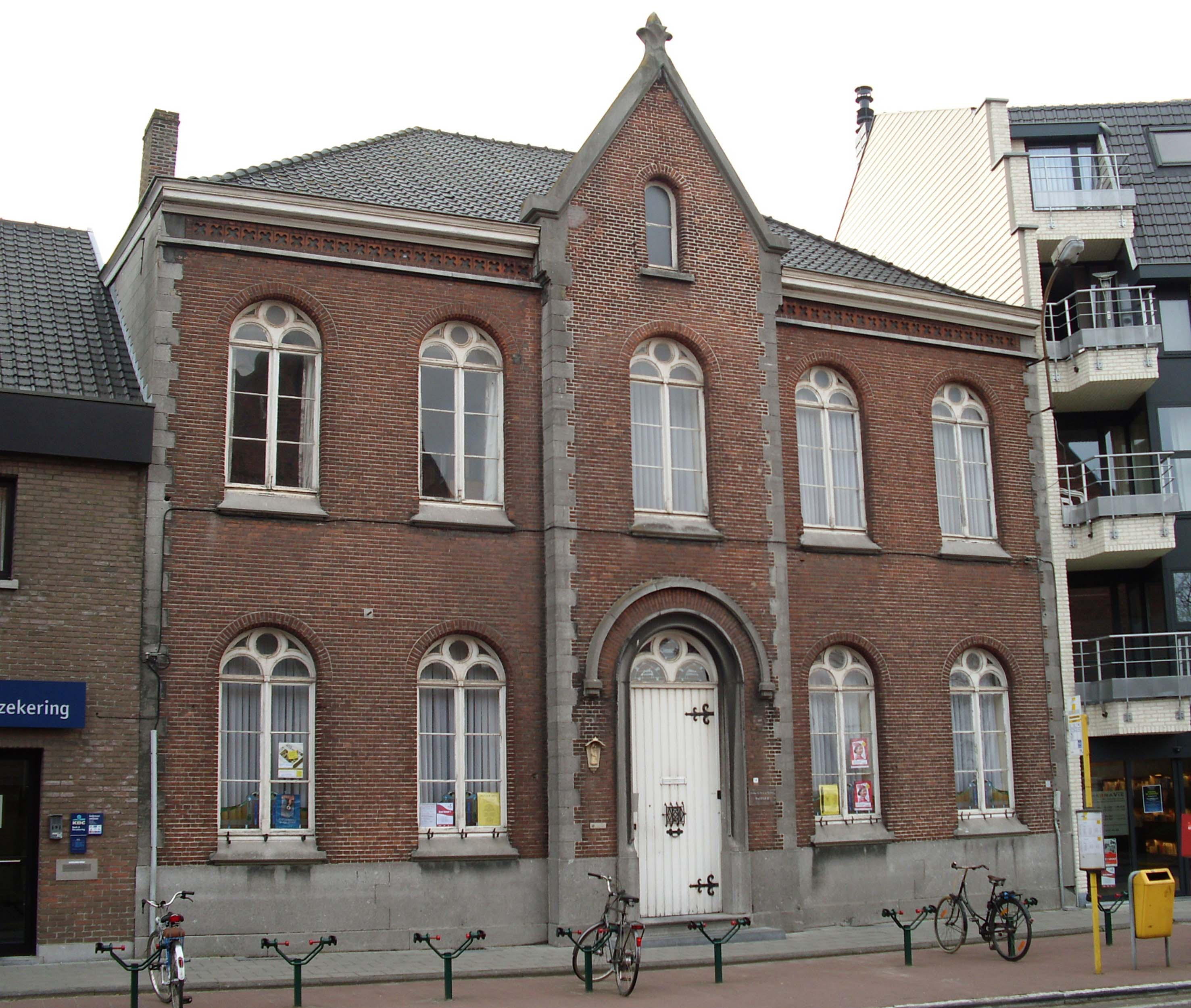 Pastorie van Assenede - Oost-Vlaanderen - Vlaanderen - België